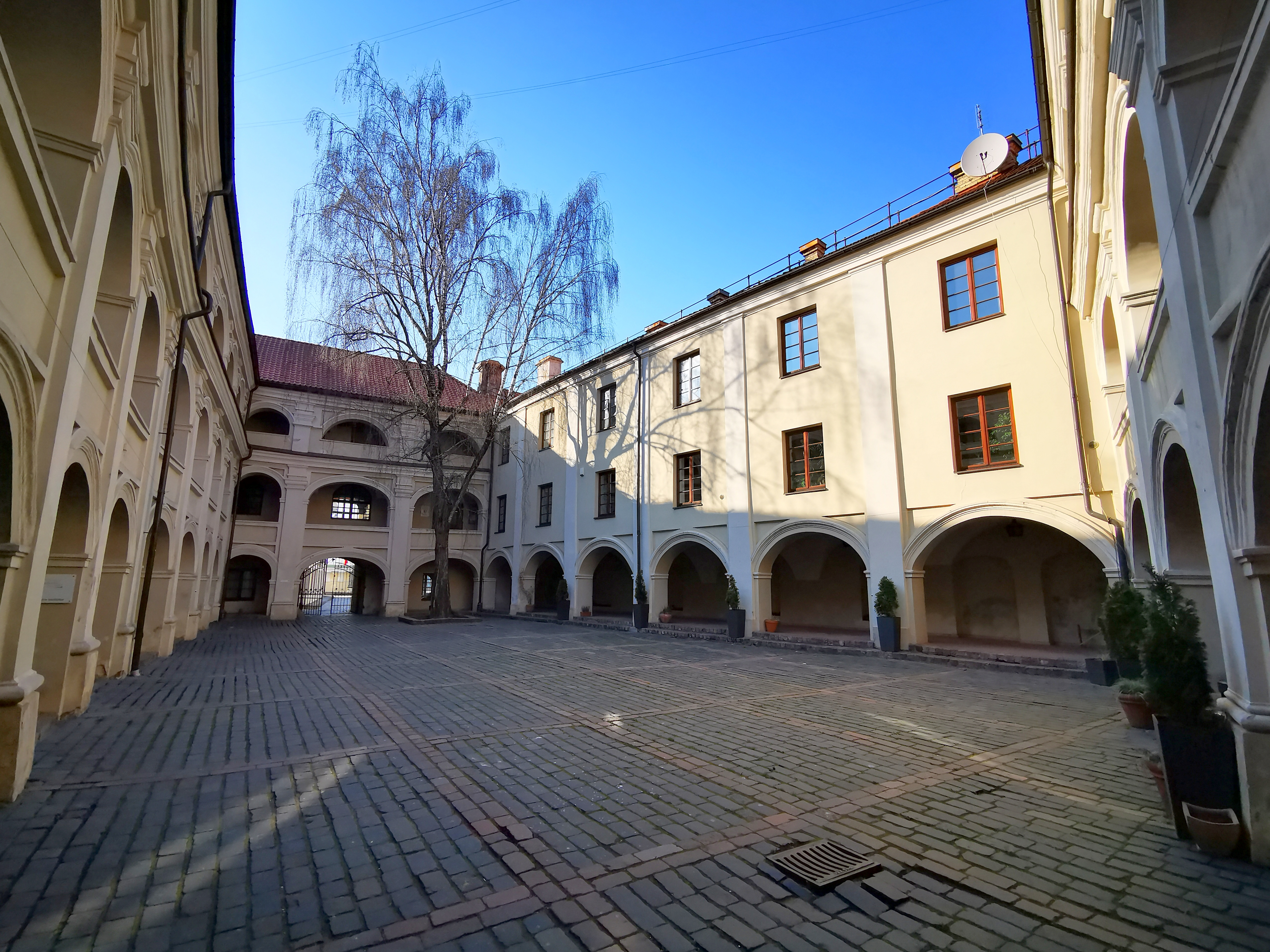 Alumnato kiemas